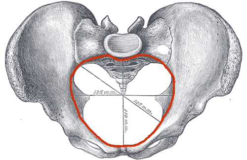 Détroit supérieur du bassin humain